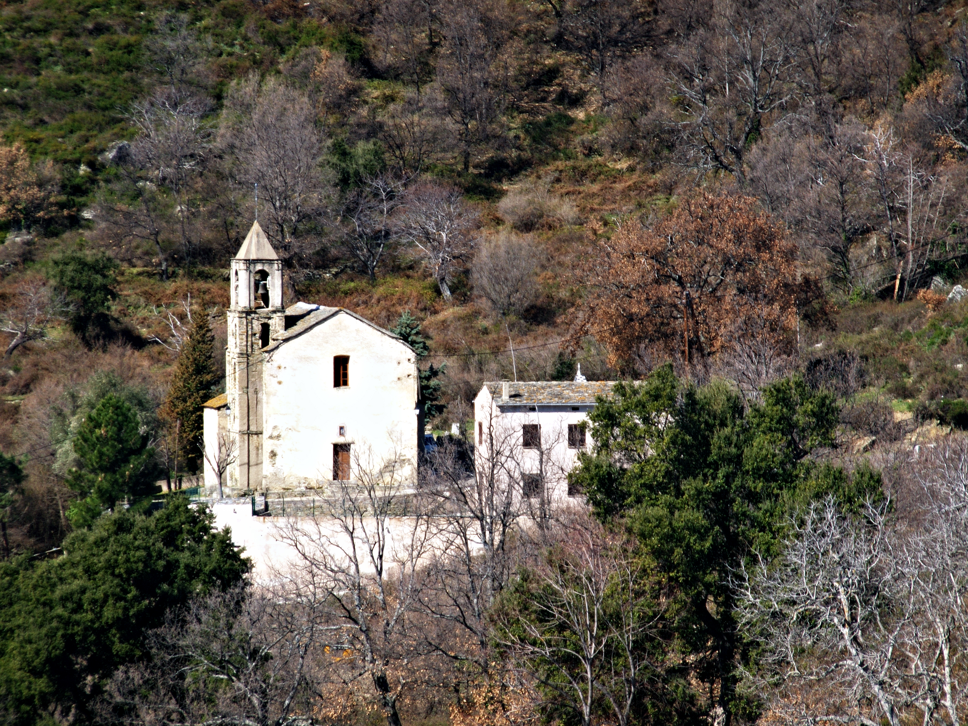 Campitello, Costere (Corse) - Église Saint-Pierre